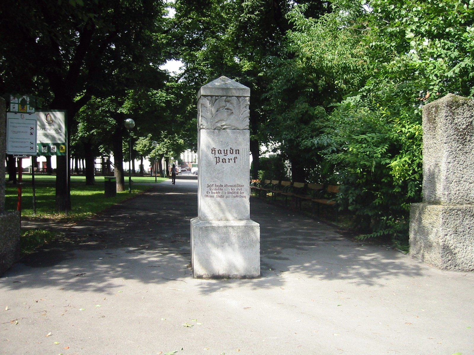 Wien, Haydnpark, Einganz Gaudenzdorfer Gürtel